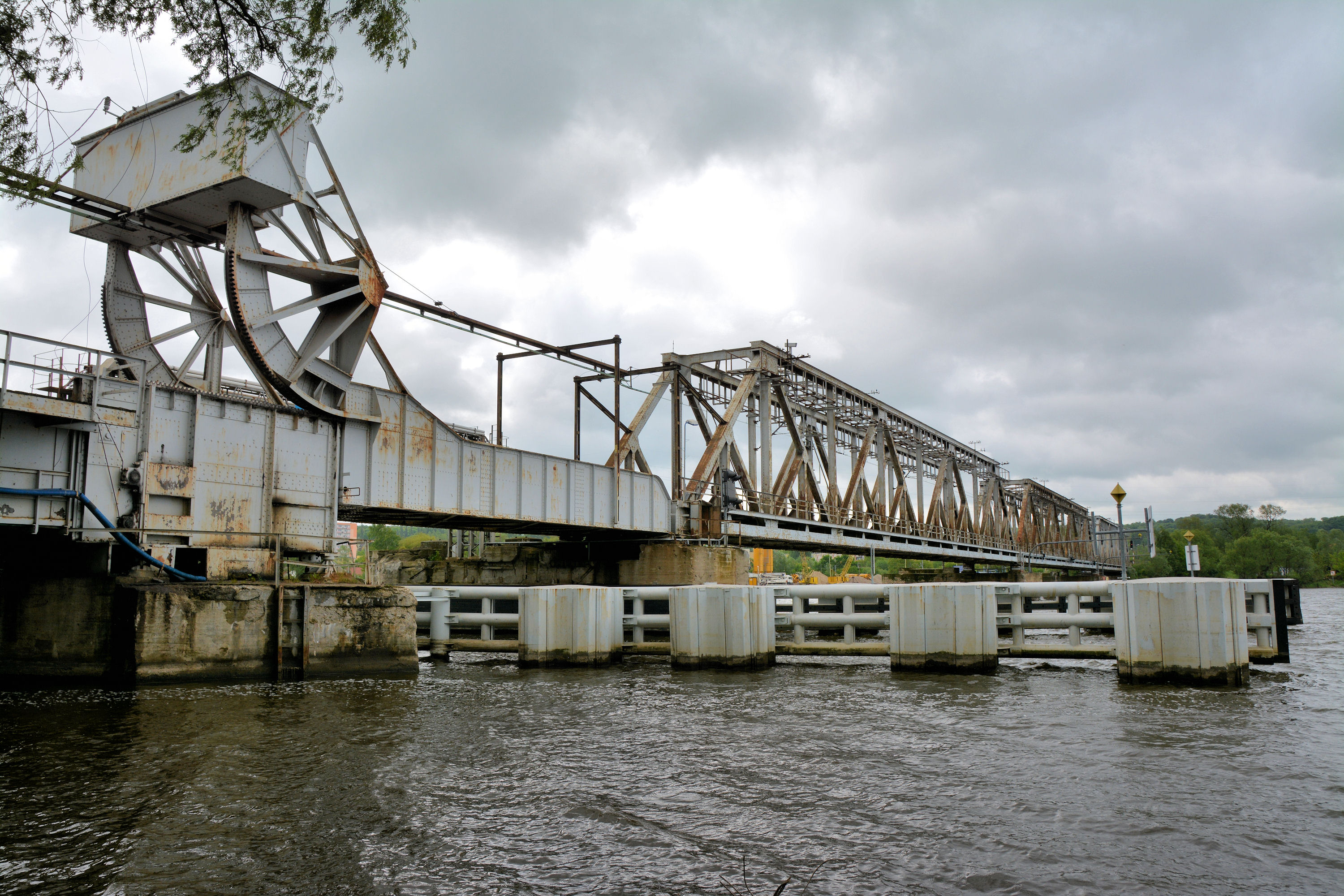 Zwodzony most kolejowy nad Regalicą w Szczecinie Podjuchach